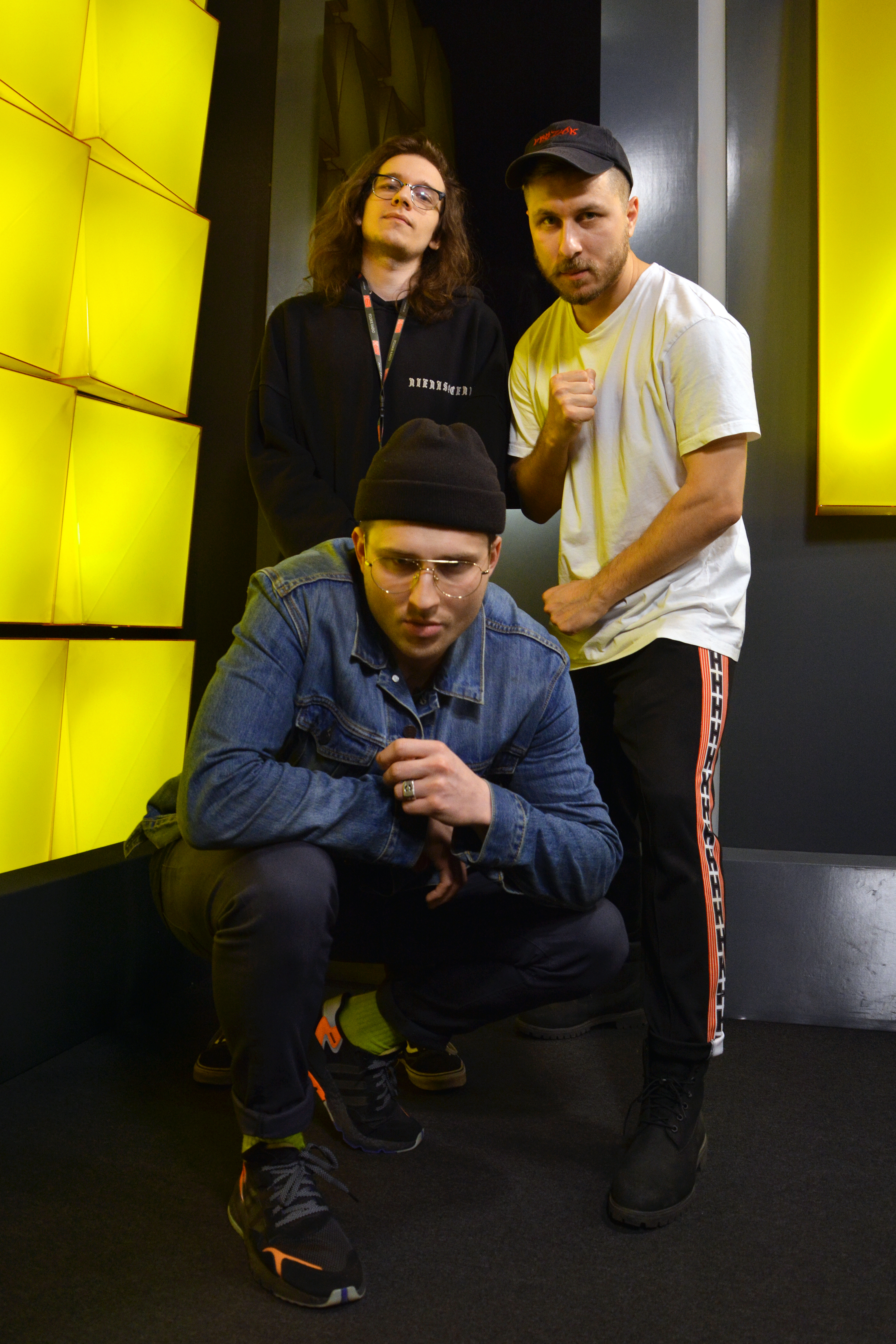 Kolektyw Czeluść z Kubą „Gargamelem” Chuptysiem z okazji wizyty w audycji „Pogłos” emitowanej na antenie Czwórki Polskiego Radia.